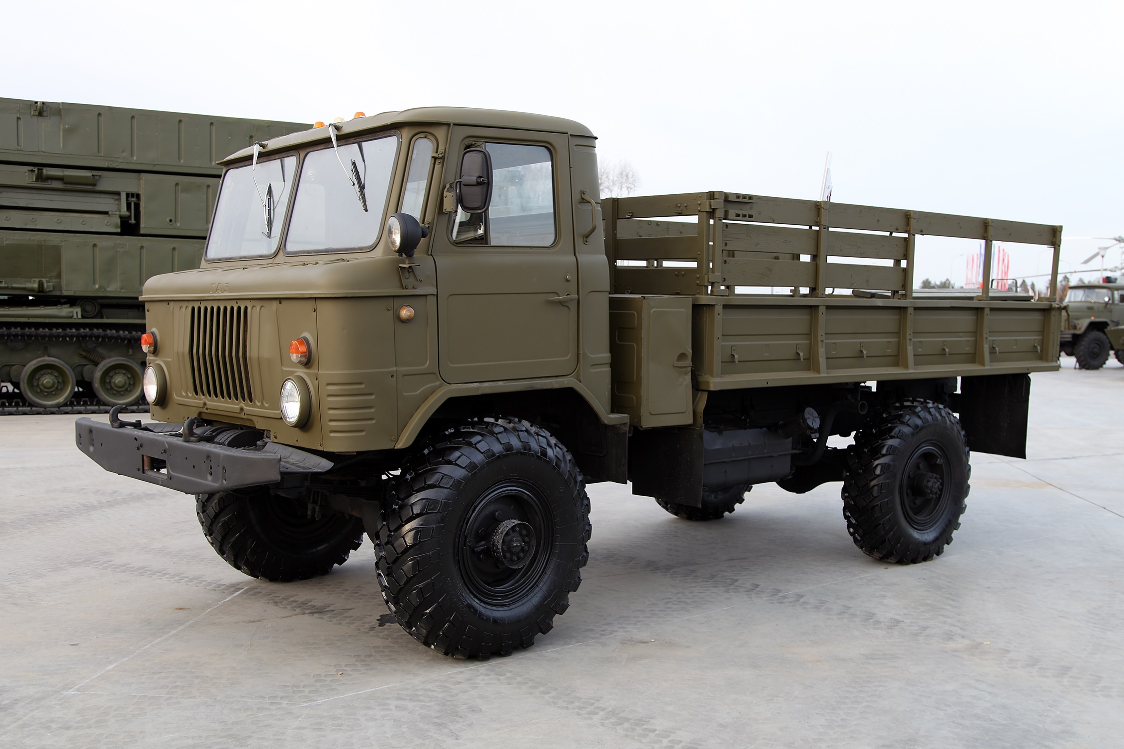 ГАЗ-66 (GAZ-66)